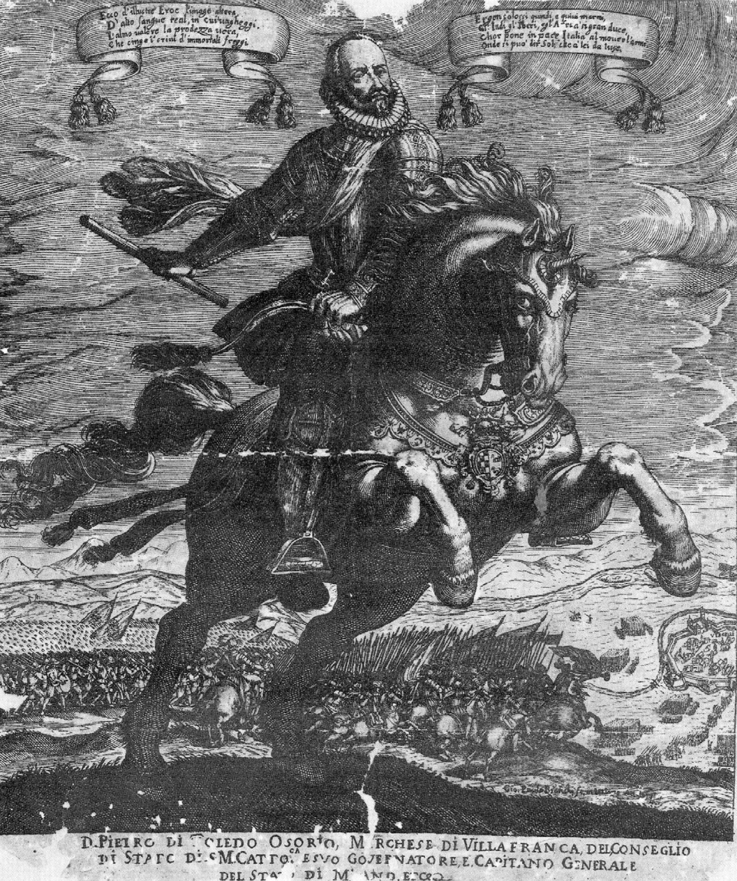 Retrato ecuestre de Don Pedro de Toledo Osorio, V marqués de Villafranca